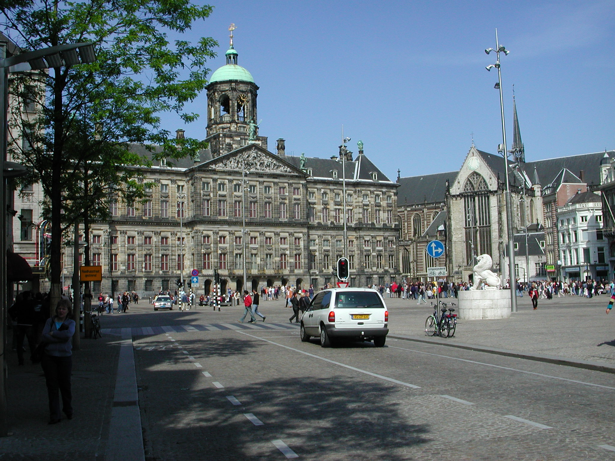 De Dam met het Koninklijk Paleis, auteur P.H.Louw, eigen werk, vrij voor gebruik, foto 2005